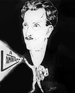 Karikatur des anarchistischen Journalisten Edgard Leuenroth mit seiner Zeitschrift A Lanterna.